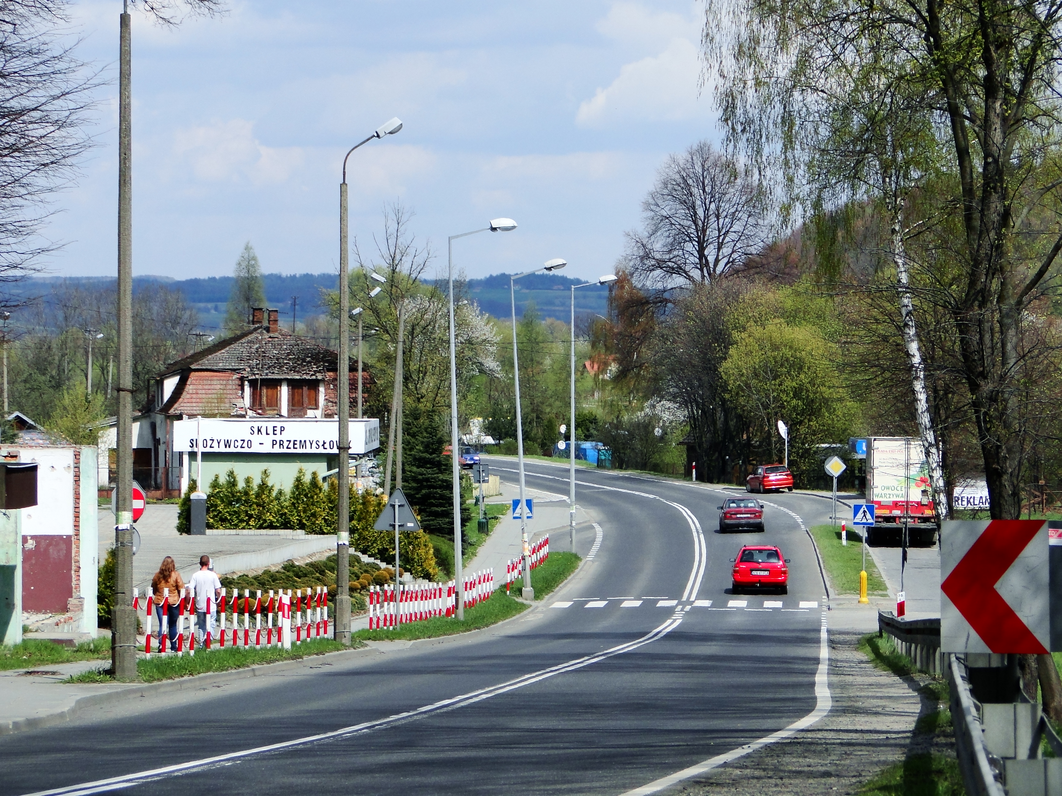 Ulica Sądecka w Czchowie (odcinek: wjazd od strony Łososiny)